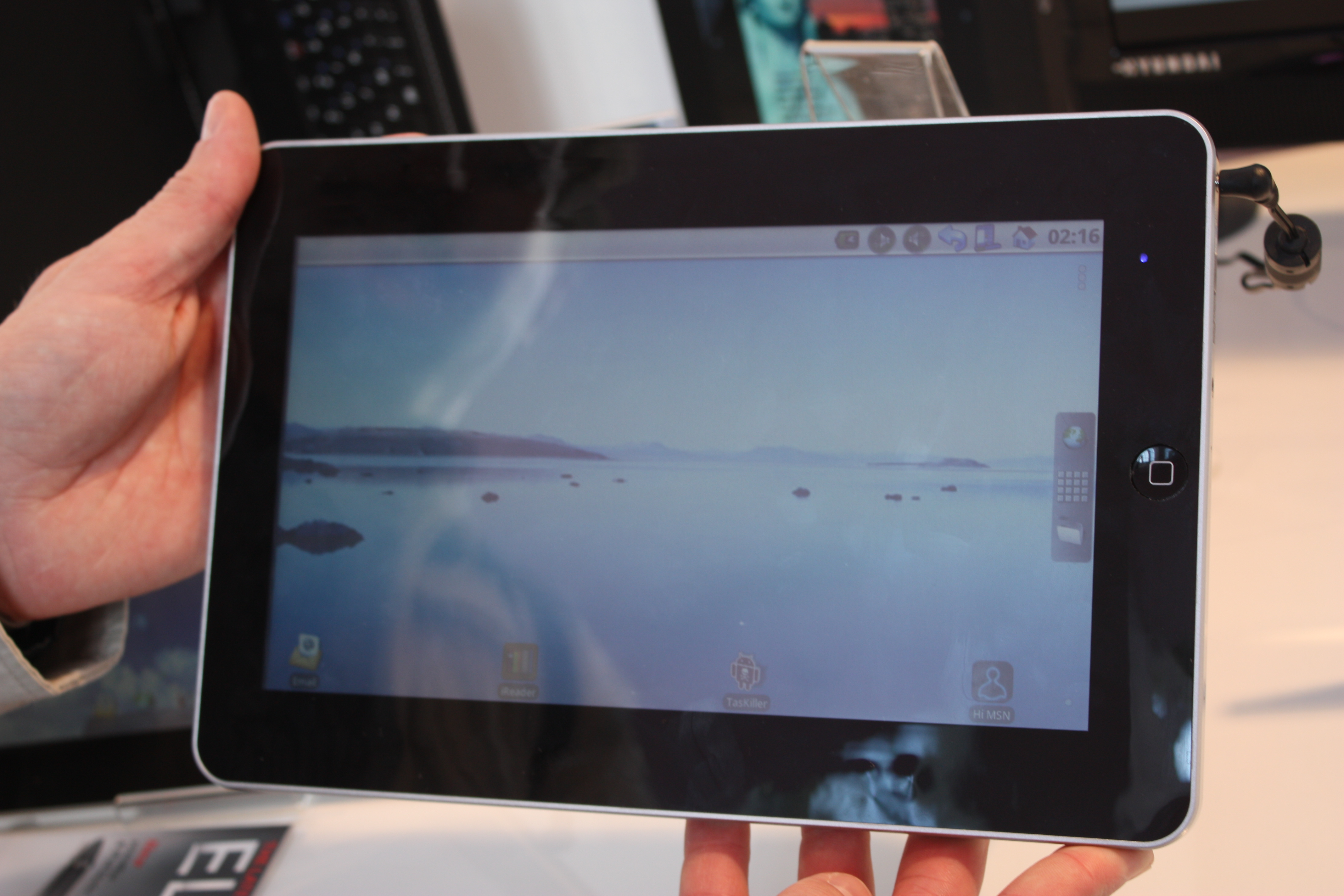 IFA 2010, Berlin